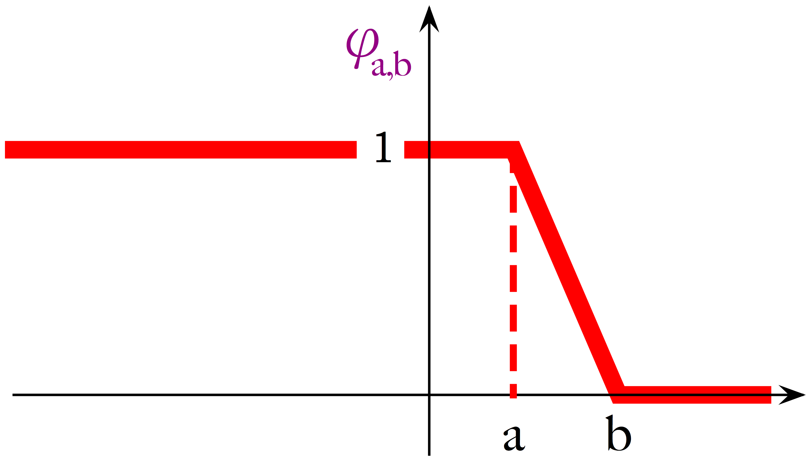 fonction affine par morceaux proche de la fonction indicatrice d'un intervalle, utile pour démontrer des propriétés élémentaire de la convergence en loi